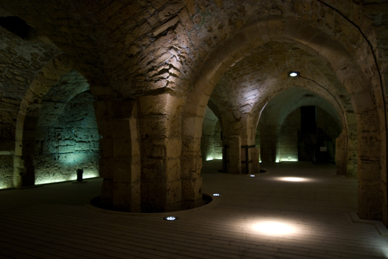 Akko, forteresse des templiers Acre